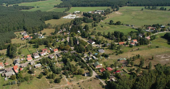 Hintersee aus der Luft